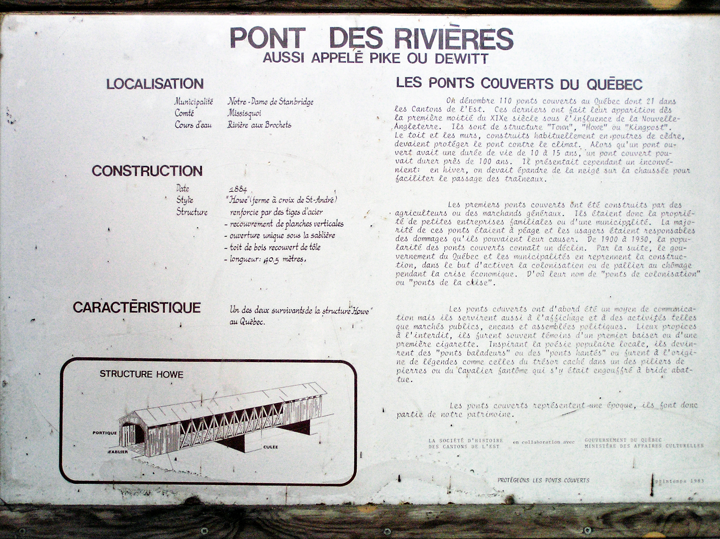 Notre-Dame-de-Stanbridge (Québec) - Informations sur le pont